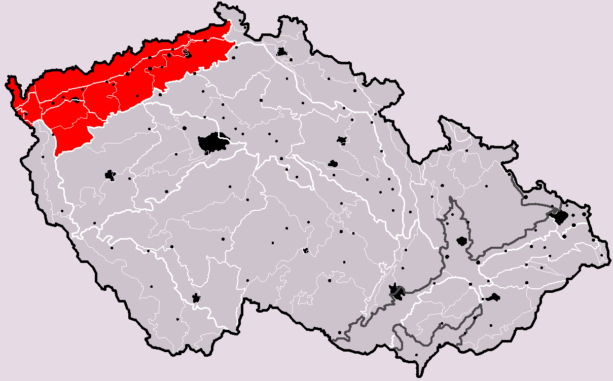 Poloha geomorfologické subprovincie (soustavy) Krušnohorská subprovincie v rámci České republiky. Hercynský systém Hercynská pohoří I Česká vysočina I3 (III) Krušnohorská subprovincie